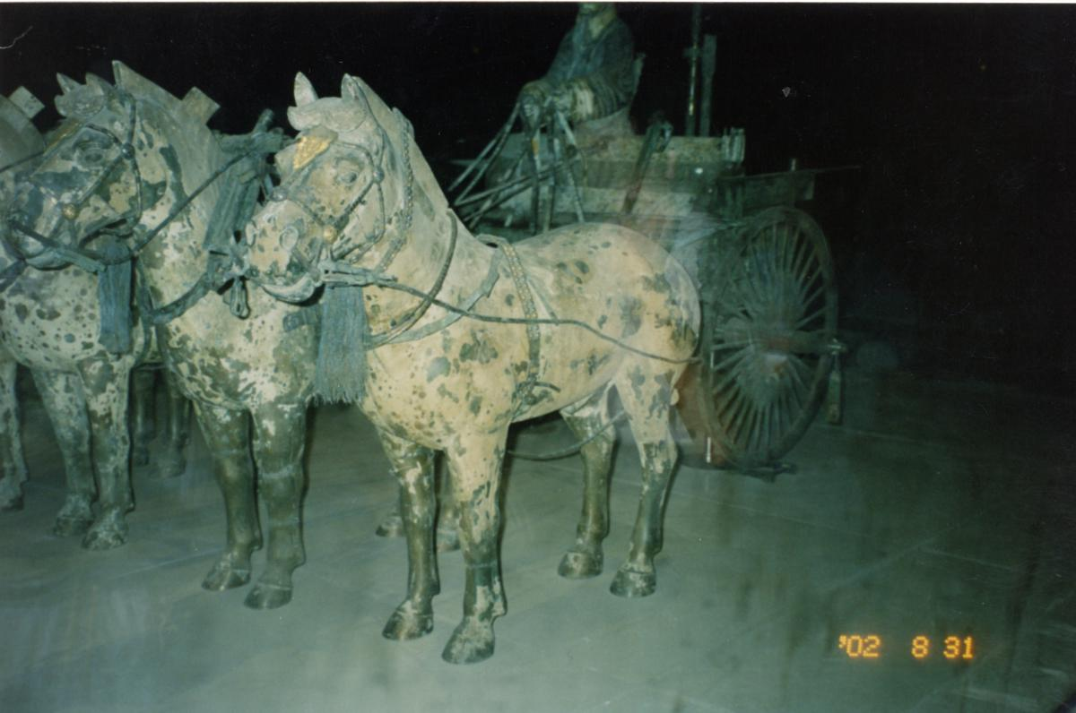 Терракотовая колесница, Сиань.